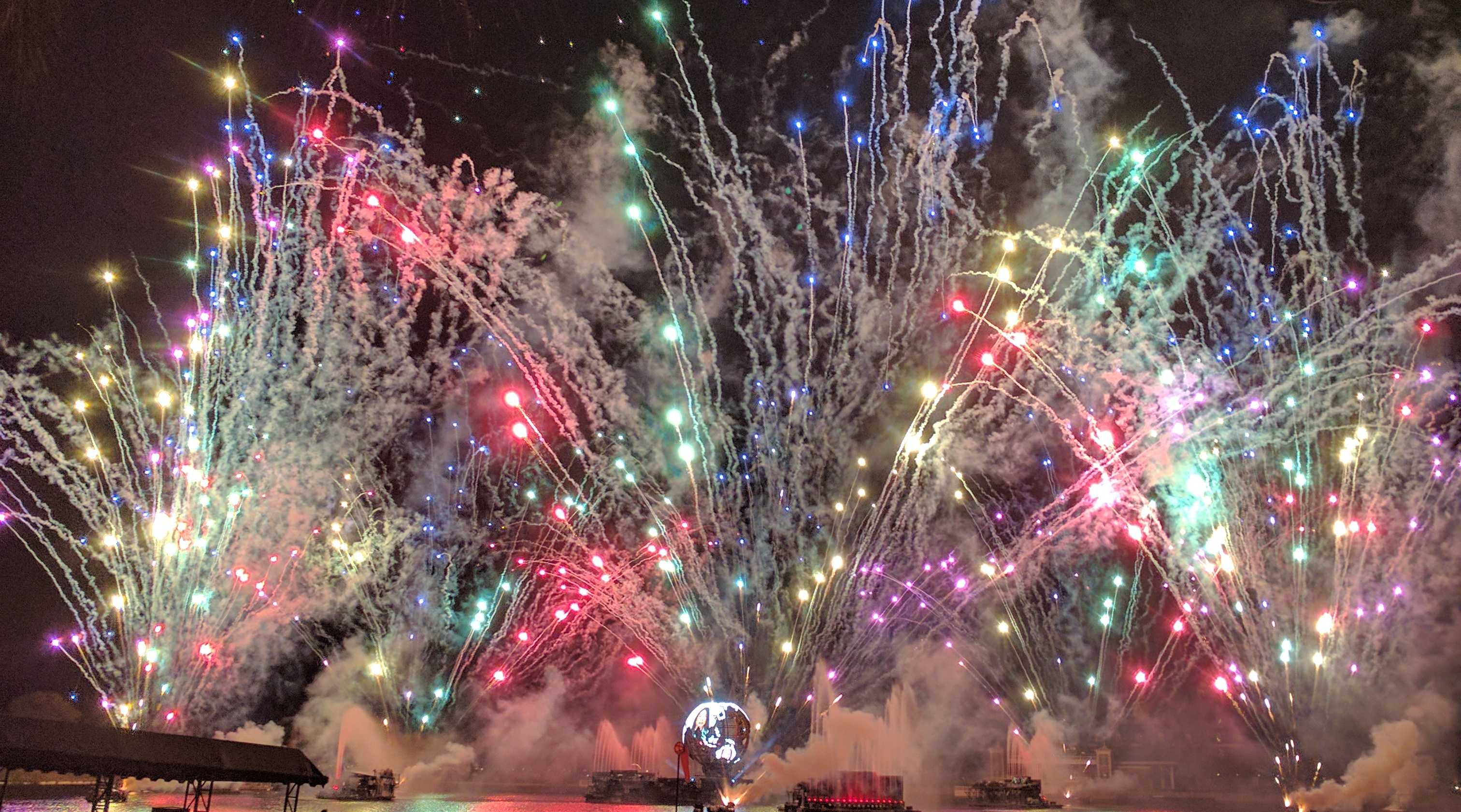 IllumiNations Holiday Tag 2016